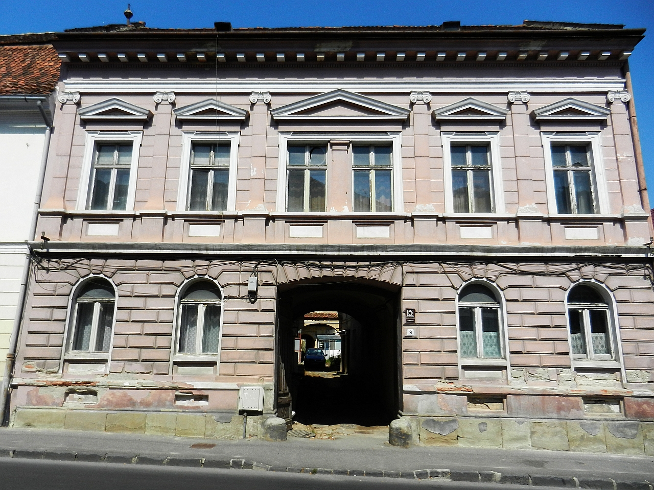 Casă - monument